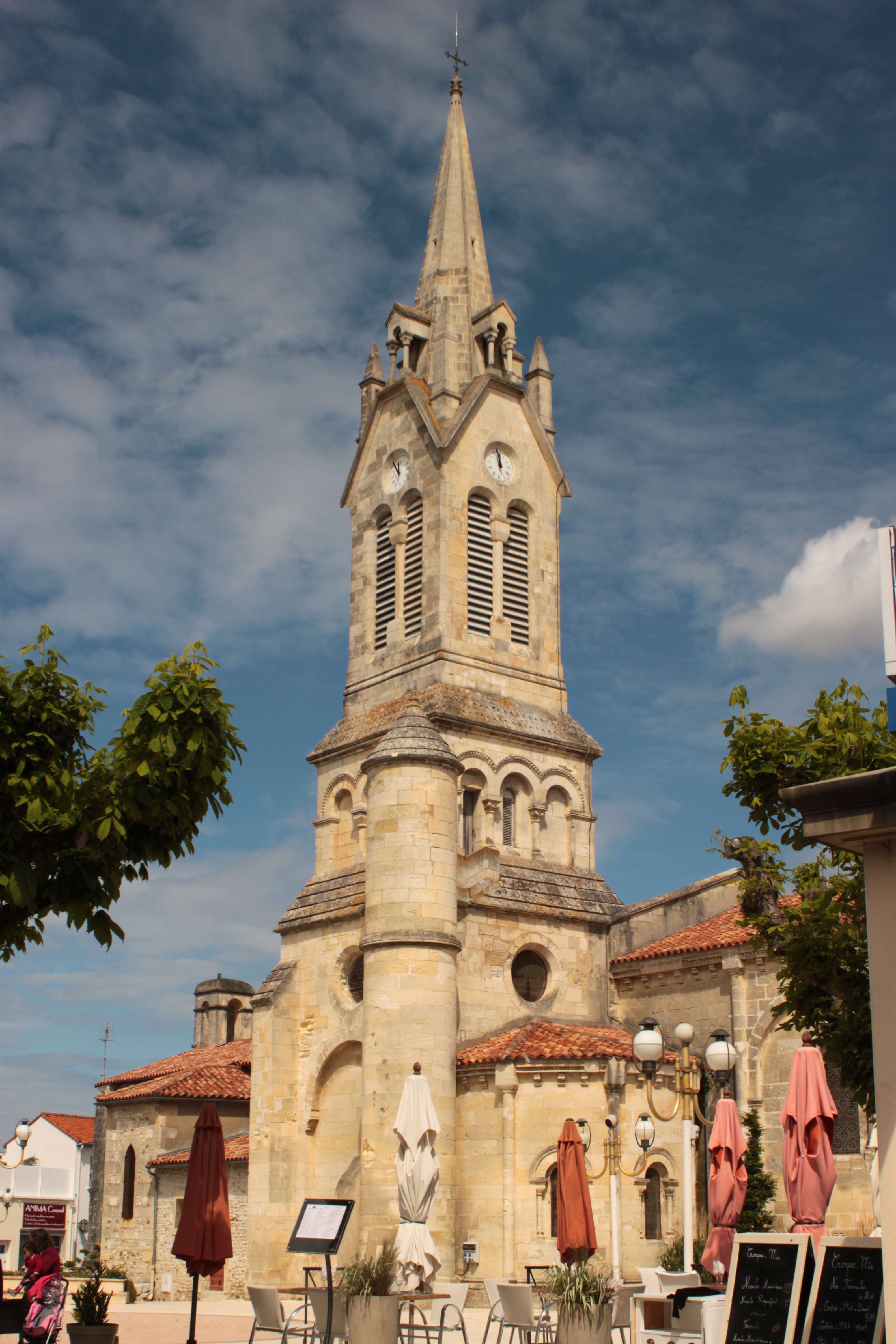 Église Saint-Georges, Fr-17-Saint-Georges-de-Didonne.